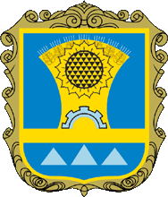 Герб Вільнянського району